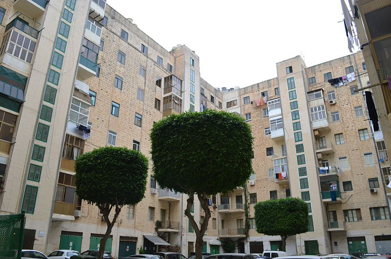 Podwórze w bloku mieszkalnym, Valletta, Malta